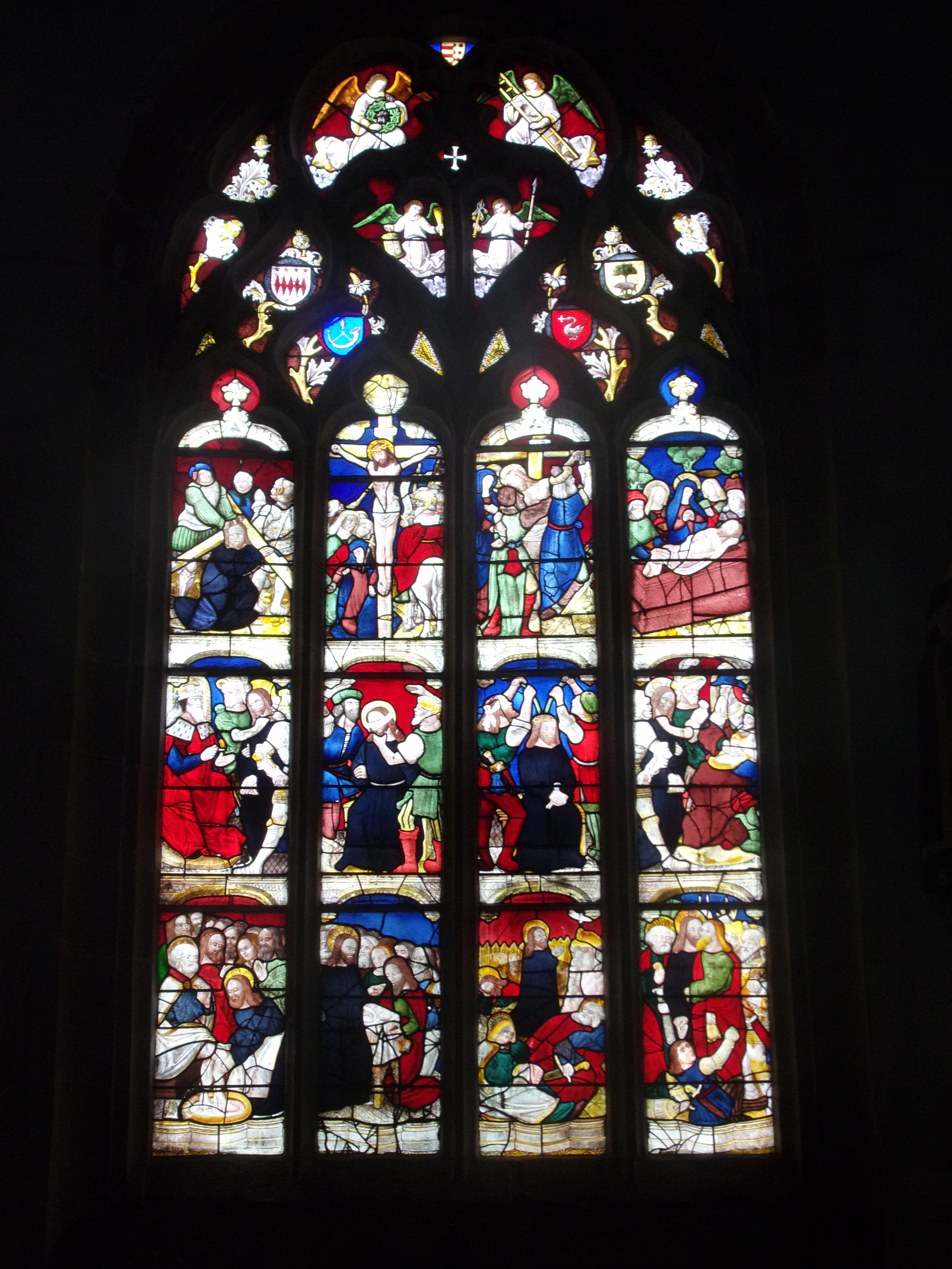 Maîtresse-vitre de l'église Saint-Conogan de Lanvénégen (Morbihan).